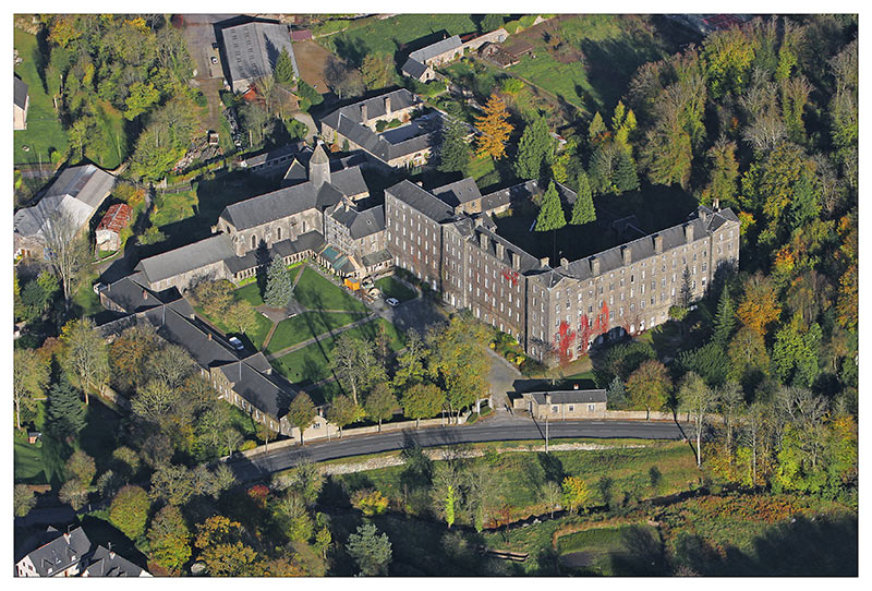 Vue aerienne Abbaye Blanche, Mortain, Manche, Normandie, France, Europe.